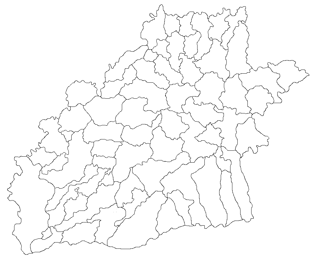 Categorie:Hărţi ale judeţului Sibiu